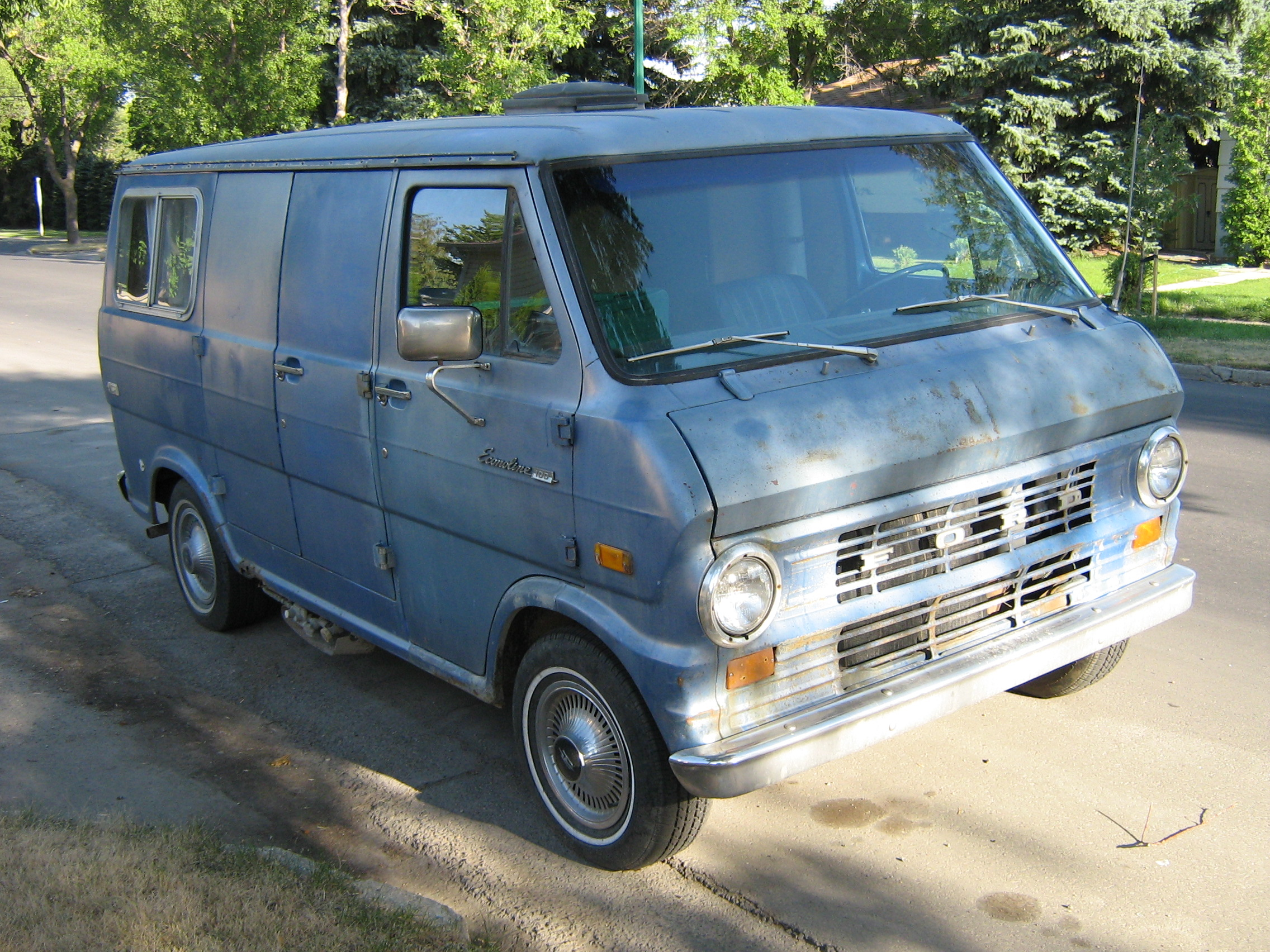 Ford Econoline